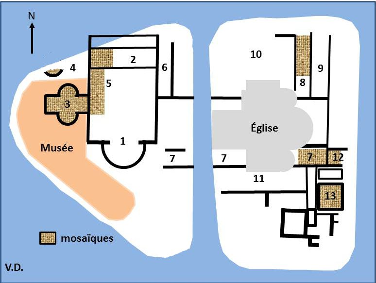 Villa gallo-romaine de Montcaret (Dordogne). Plan du site. 1=Grande salle à abside, 2=zone de l'hypocauste, 3=salle cruciforme, 4= construction circulaire, 5=vestibule de la grande sale ; 6, 7, 8, 9=galeries, 10=cour-jardin, 11=terrasse, 12=entrée des thermes, 13=piscine